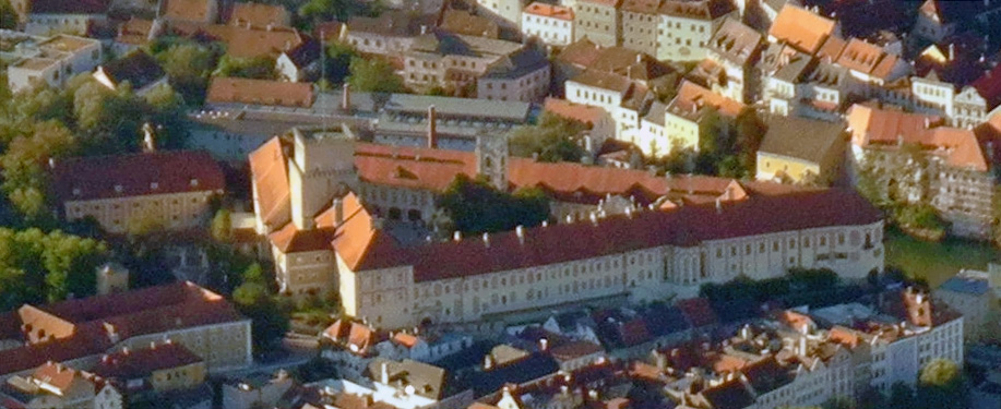 Luftbild von Schloss Lamberg in Steyr